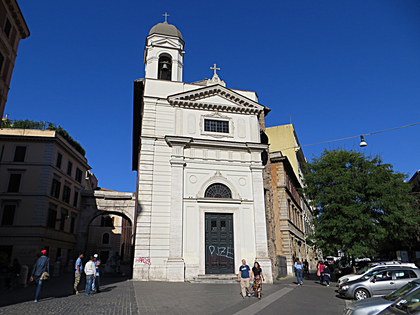 Parrocchia Santa Maria Maggiore in San Vito